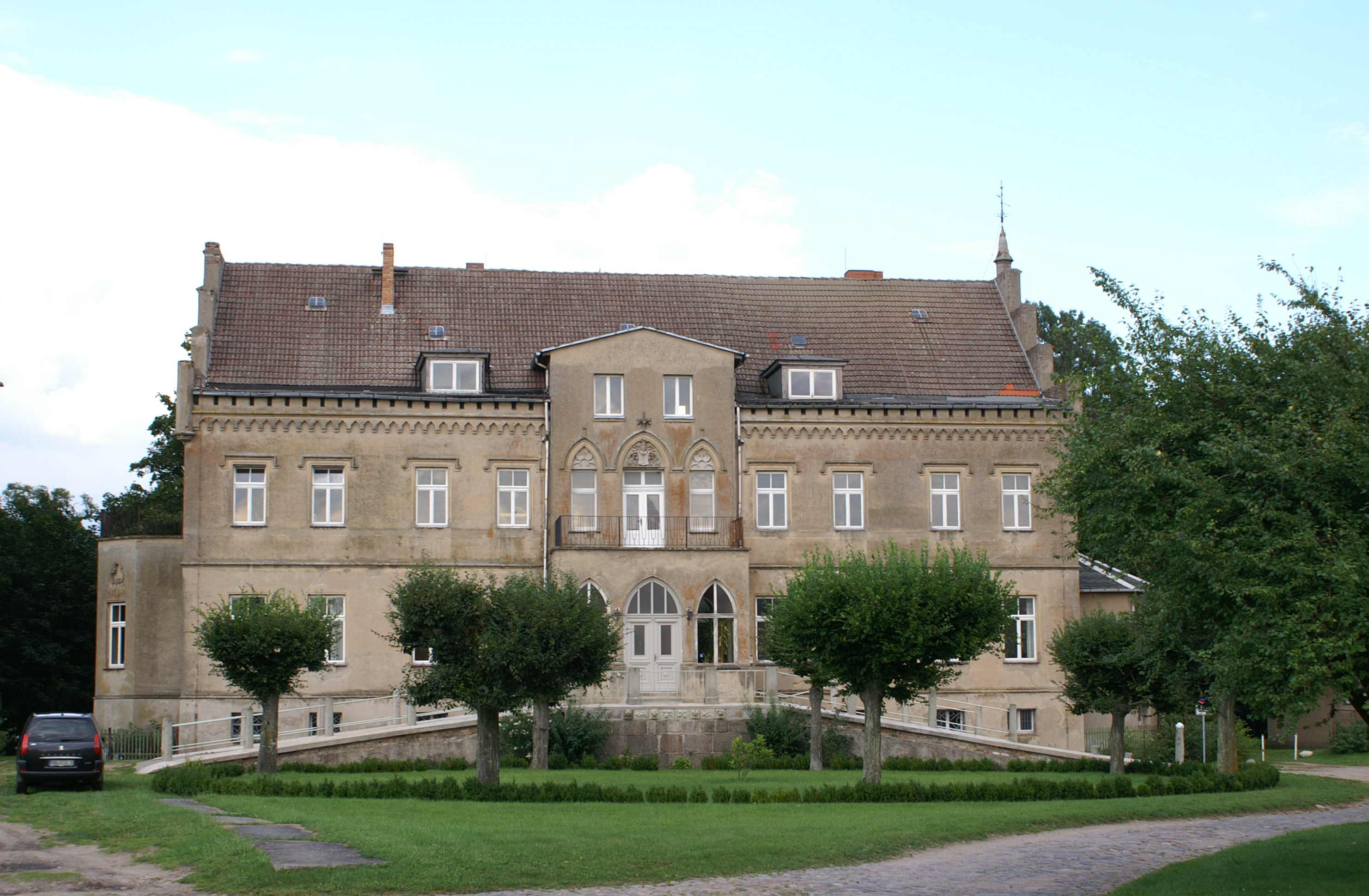 Wrangelsburg - Landkreis Ostvorpommern - Herrenhaus Westseite